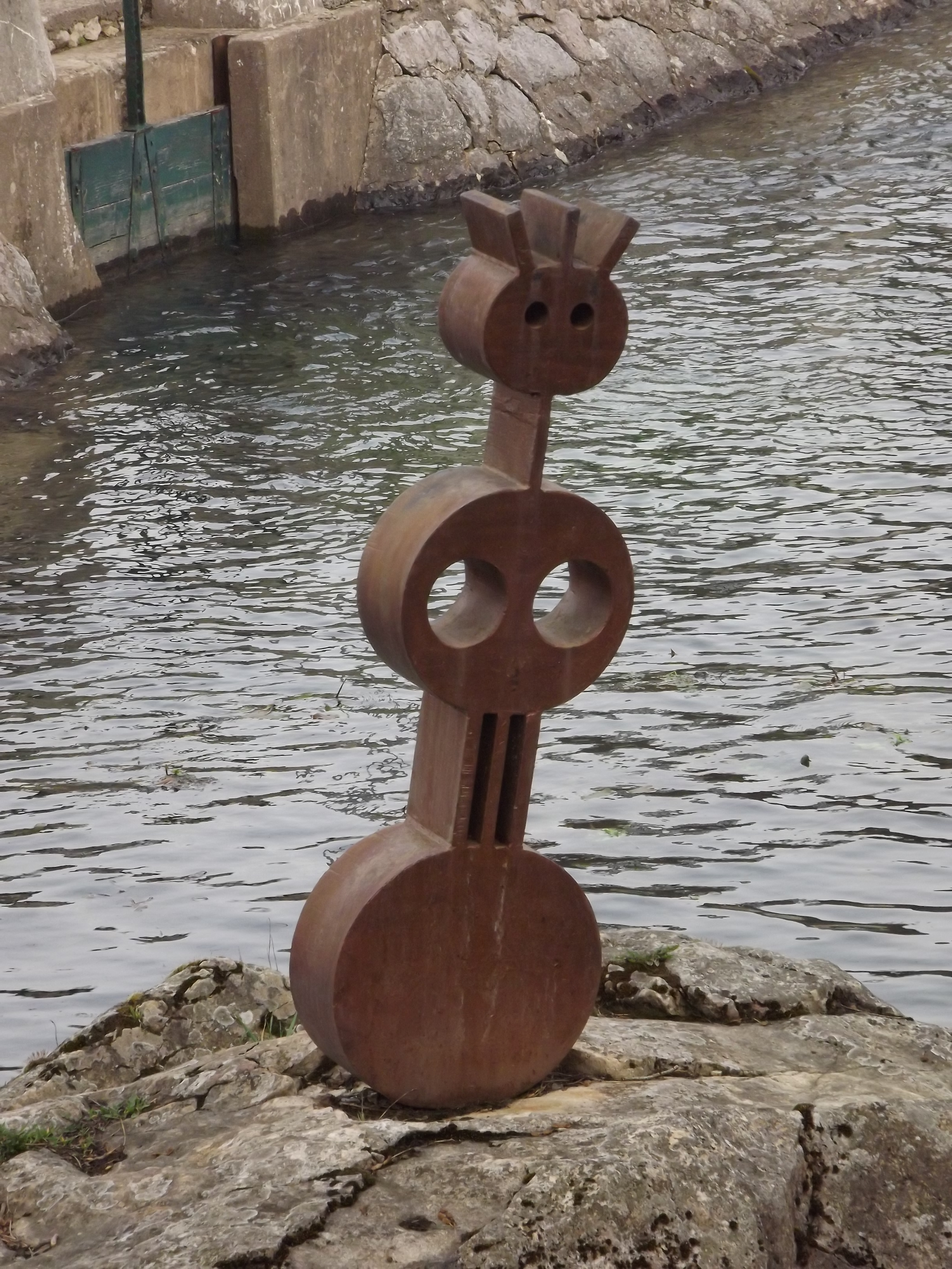 Srpski (latinica): Zvonimir Kostić Palanski, vajar iz Niša. Devojka na steni (2007) skulptura u slobodnom prostoru, Bala Palanka, Srbija